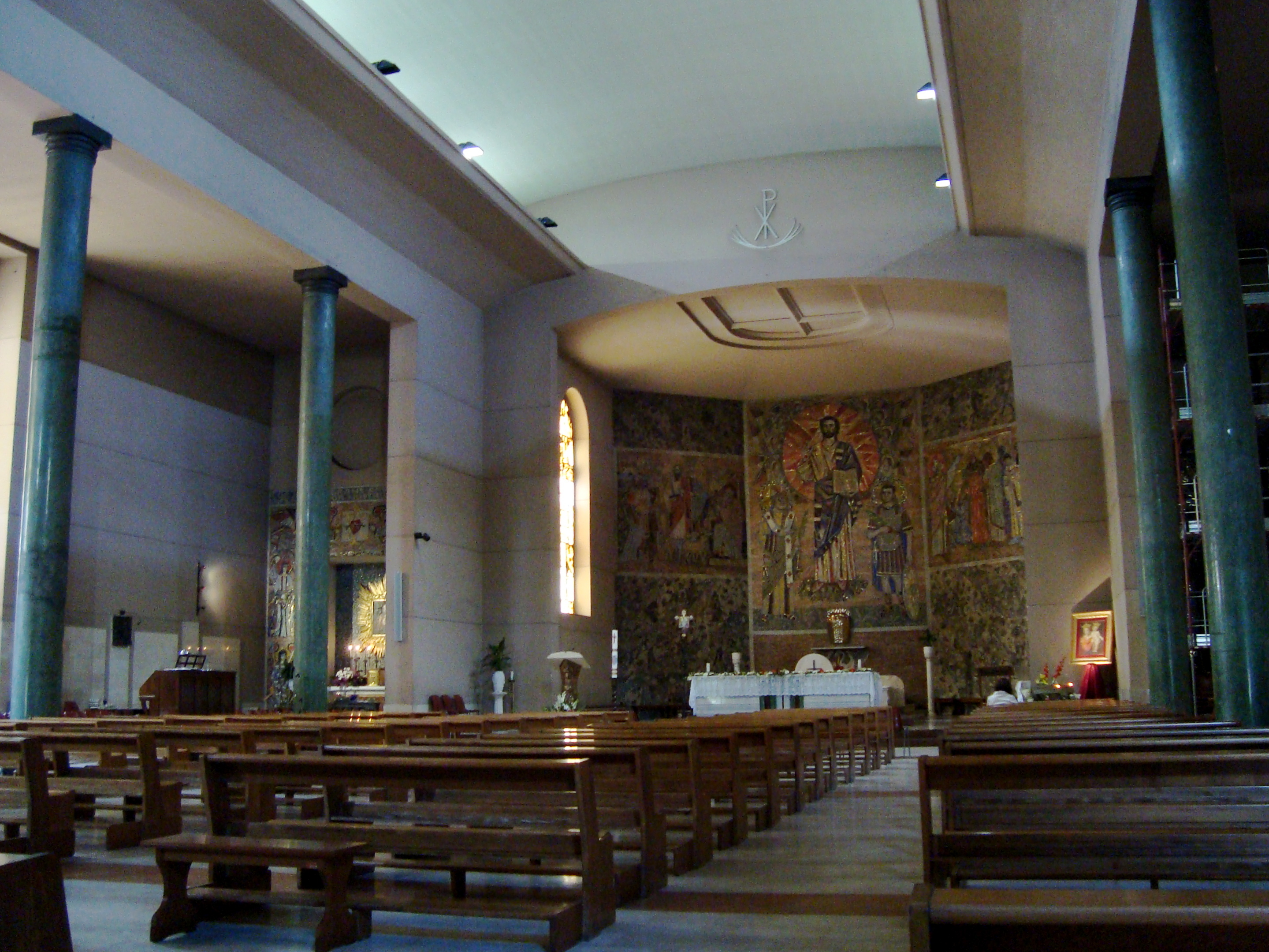 Eglise Santi Fabiano e Venanzio de Rome, vue intérieure.